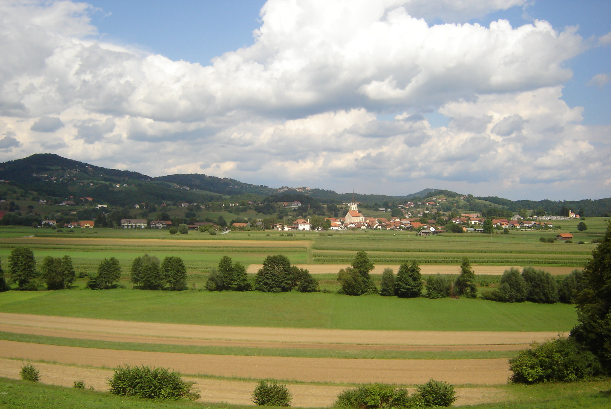 Šentrupert